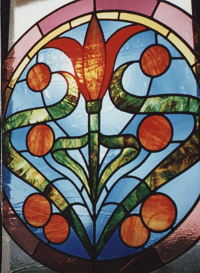 Ez a kép a hódmezővásárhelyi zsinagóga felújított üvegablakának részletét mutatja.